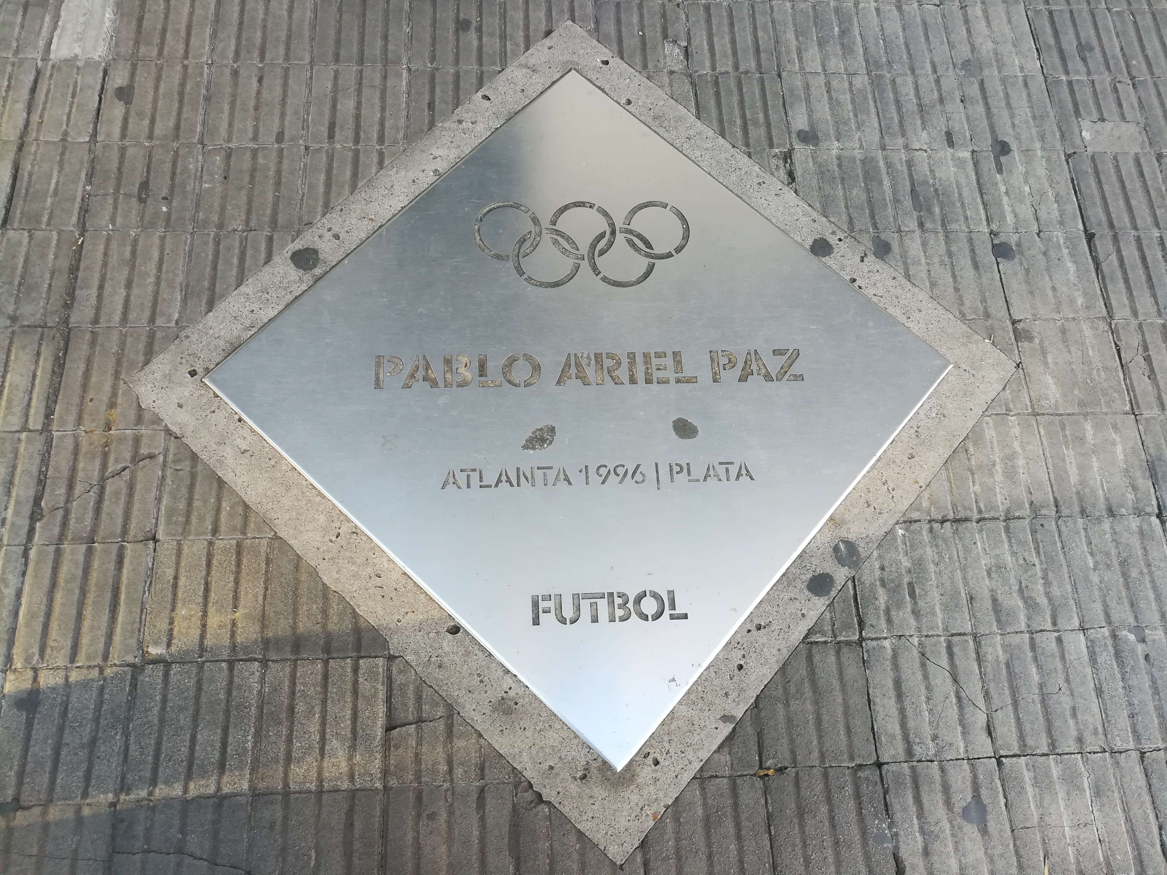 Paseo de los Olímpicos de los en la Avenida Pellegrini (Rosario).